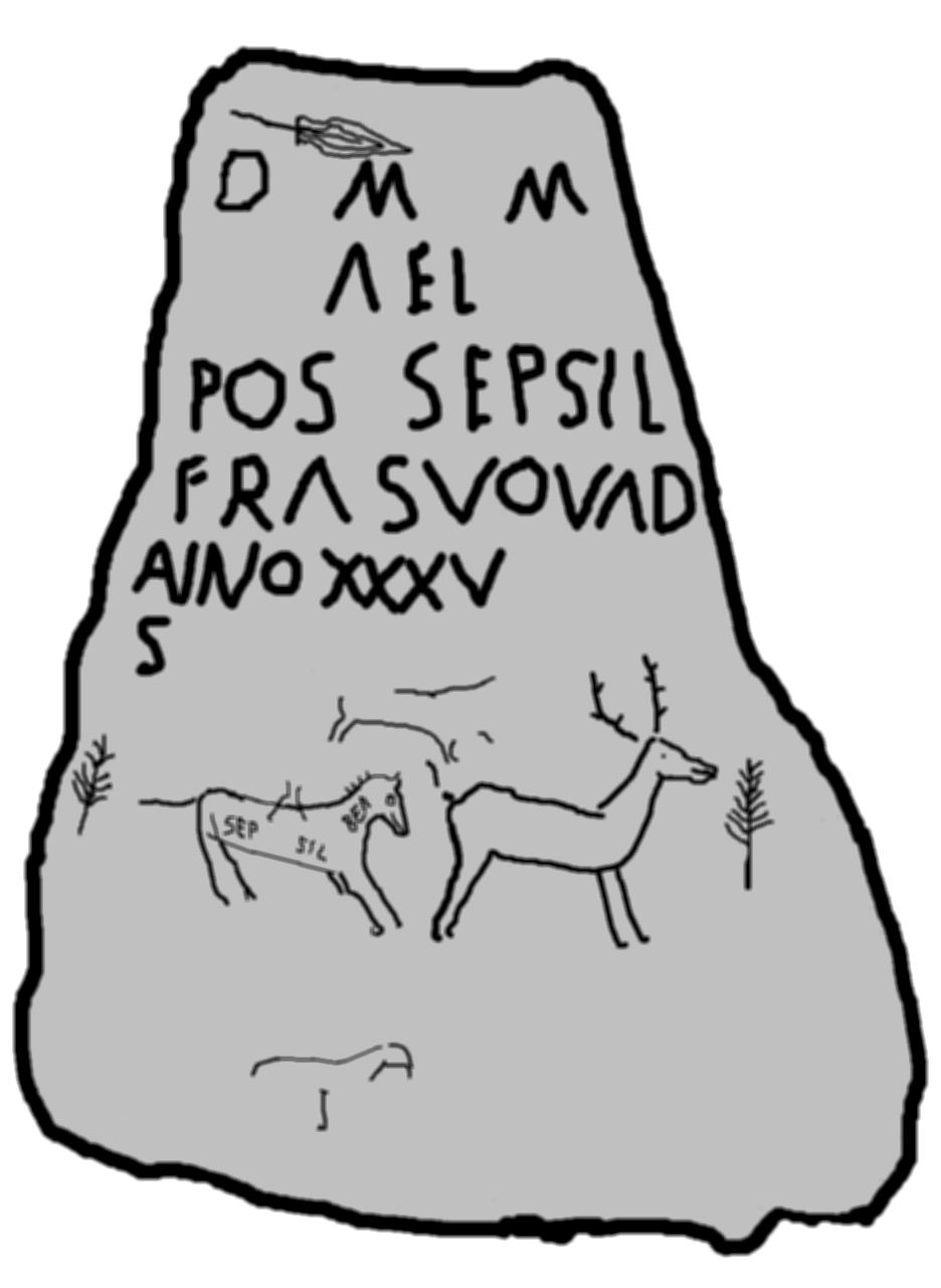 Estela vadiniense. Inscrición de calter funerariu de Beleño (Asturies). Ta dedicada a Septimio Silo y presenta ente les sos figuraciones un puñal d'antenes enrriba, y el nome del difuntu Sep Sil grabáu nel interior d'un caballu.